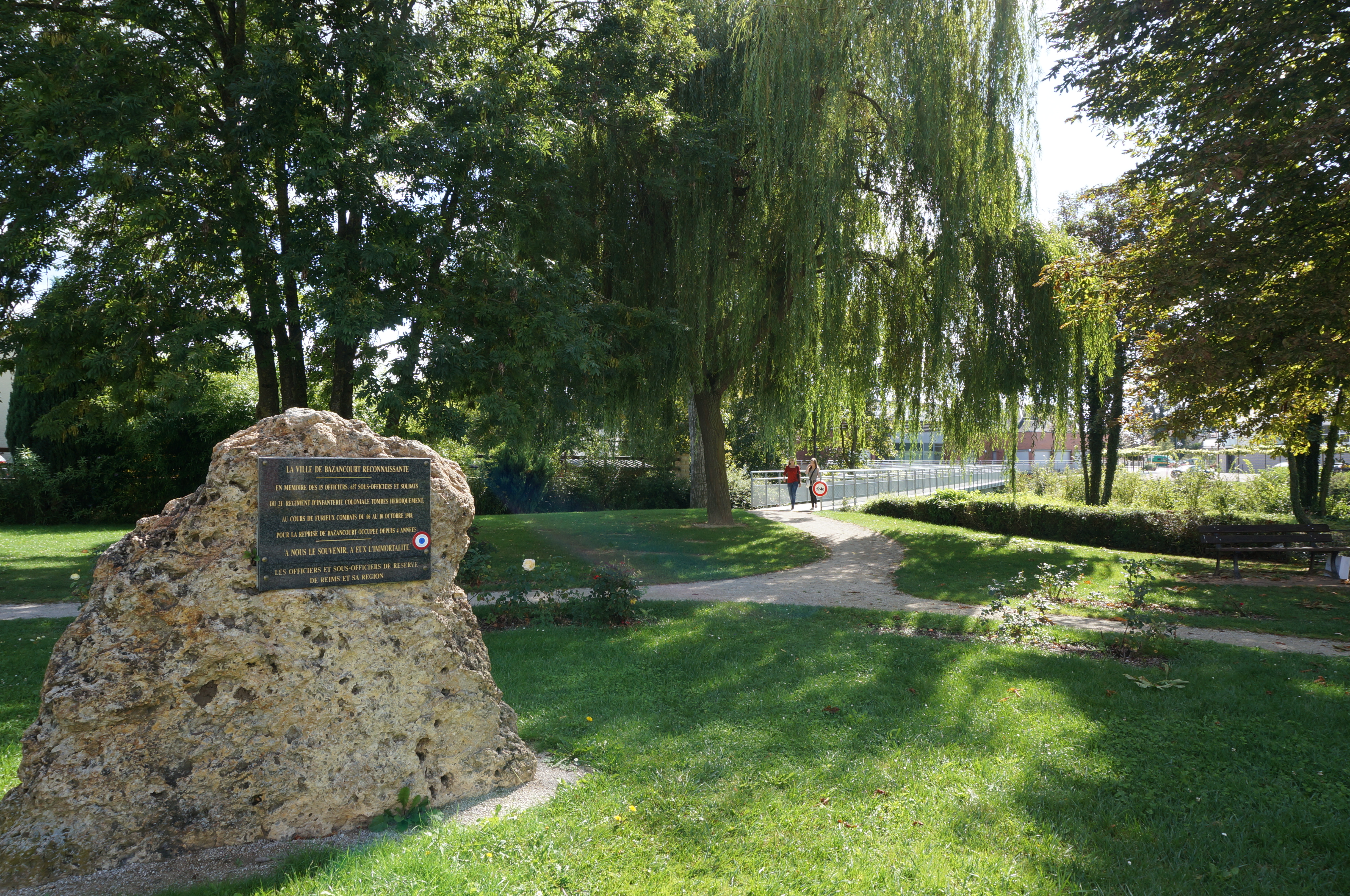 Mémorial au 21e régiment d'infanterie coloniale pour la libération de Bazancourt 1918.